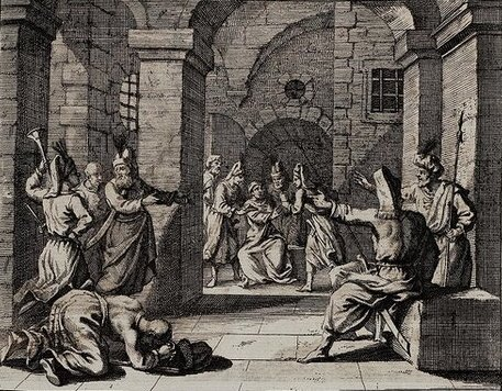 Saltan ikinci Osman'ın Yedikule'de boğuîuşu